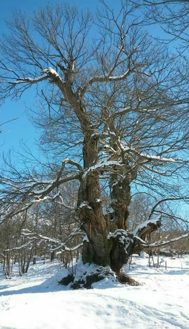 Este castaño esta en libran y tiene cerca de mil años